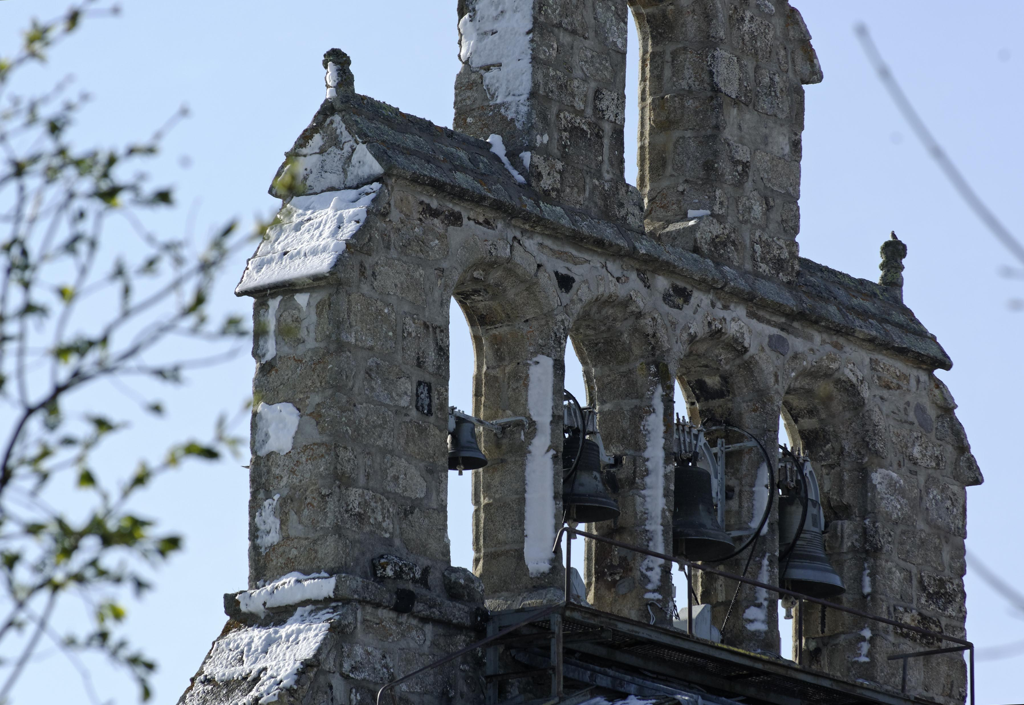 Église Saint-Pierre de Chastel, (Inscrit, 1964) .